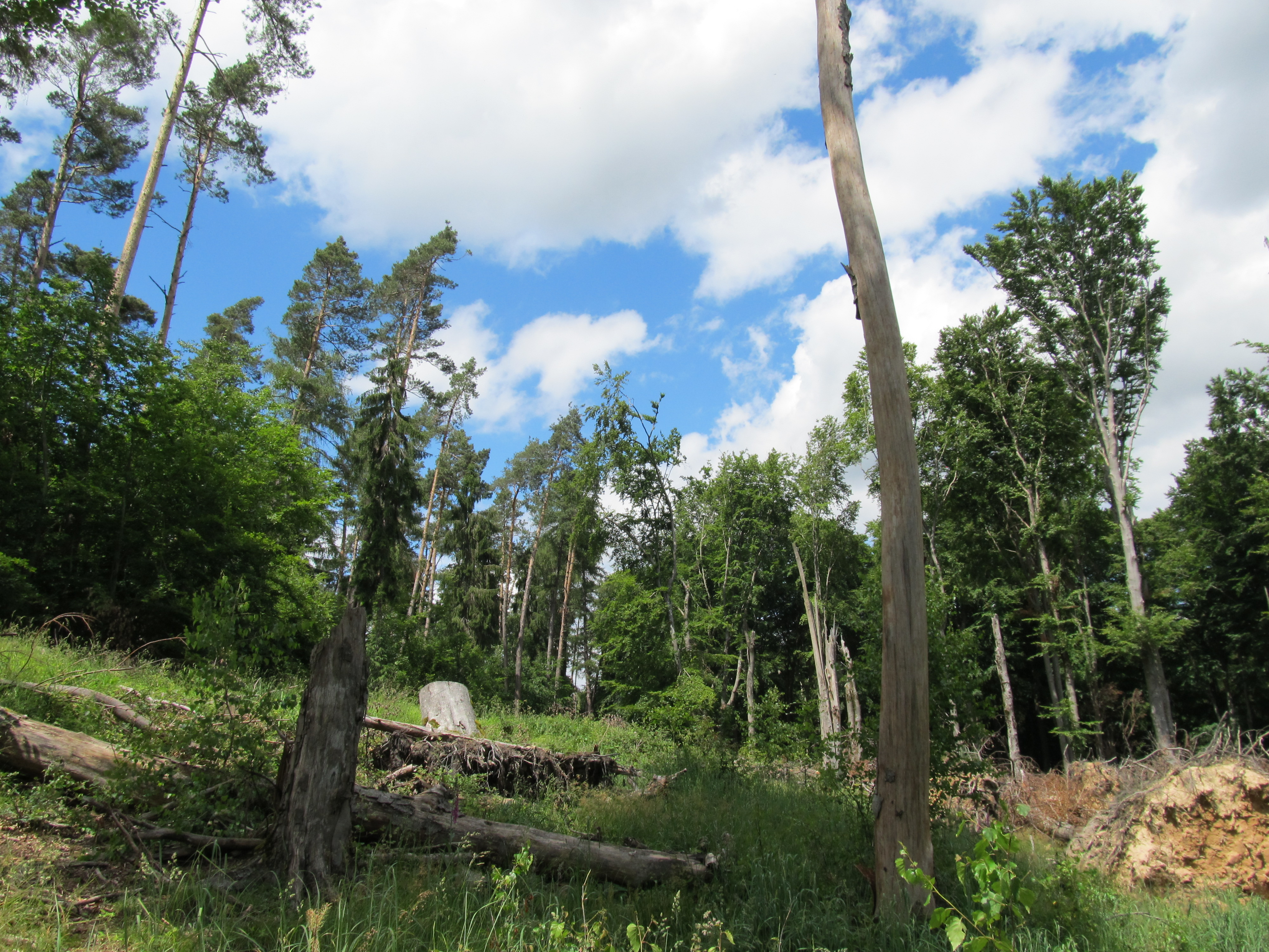 Der Bromberg im Naturpark Schönbuch bei der ehemaligen Einsiedelei - Blick zum Bannwald Silbersandgrube.